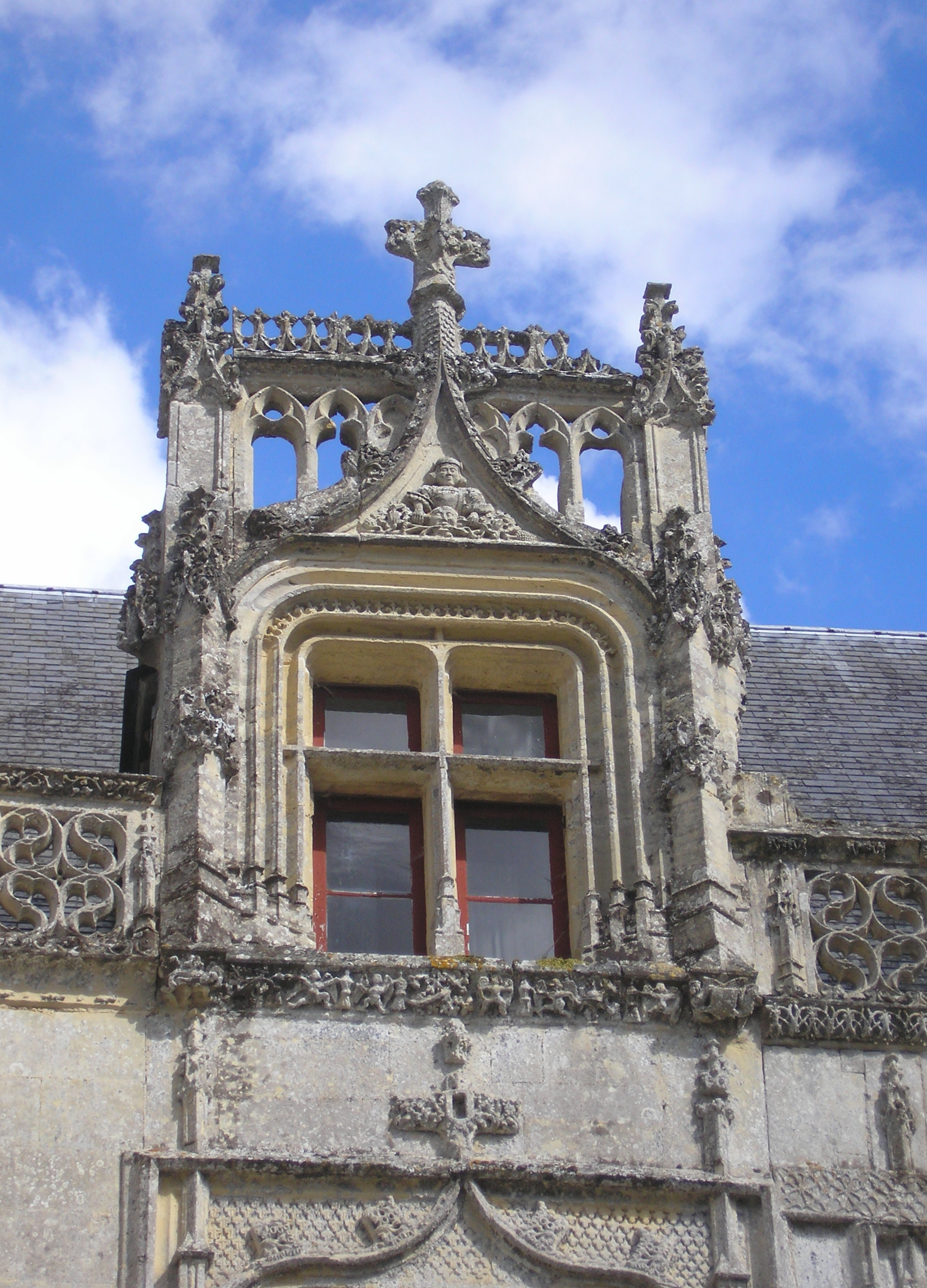 Fontaine-Henry (Normandie, France). Fenêtre de la façade ouest du château.